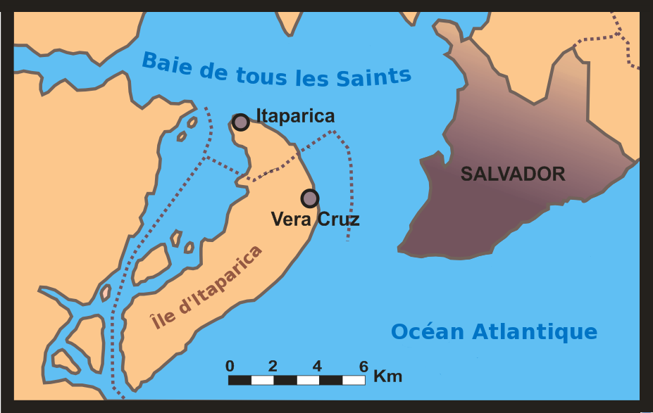 Version française de Image:Ilha de Itaparica.png